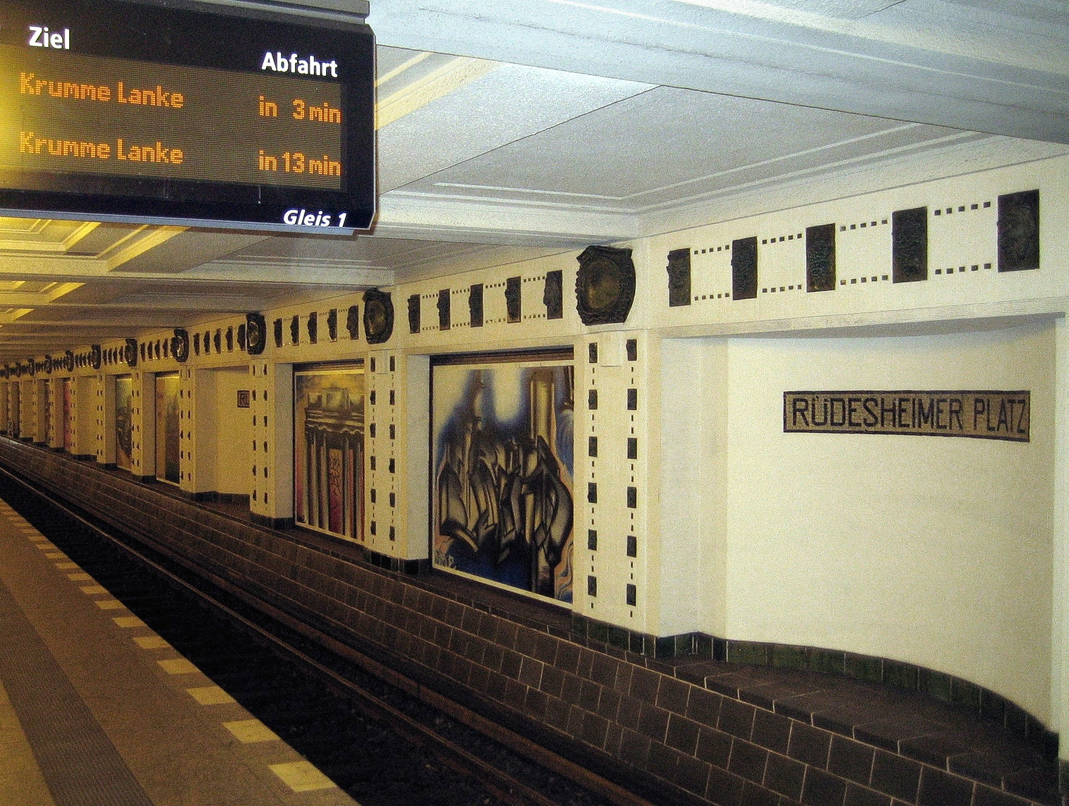 Berlin, U-Bahnhof Rüdesheimer Platz, Gleis 1.